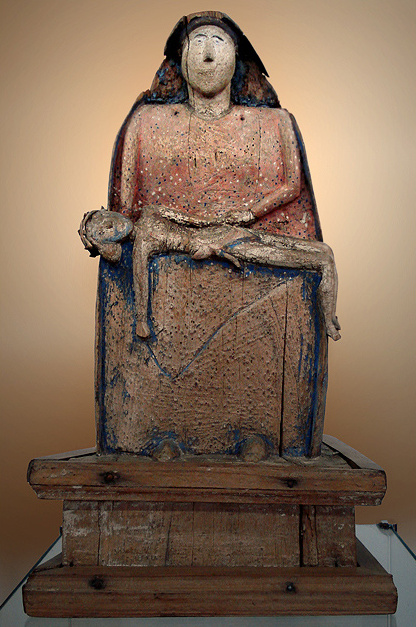 Pietà